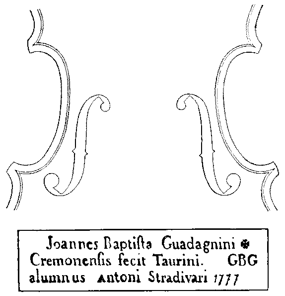 Ouïes, échancrures, coins et étiquette d’un violon de Giovanni-Battista Guadagnini - 1777